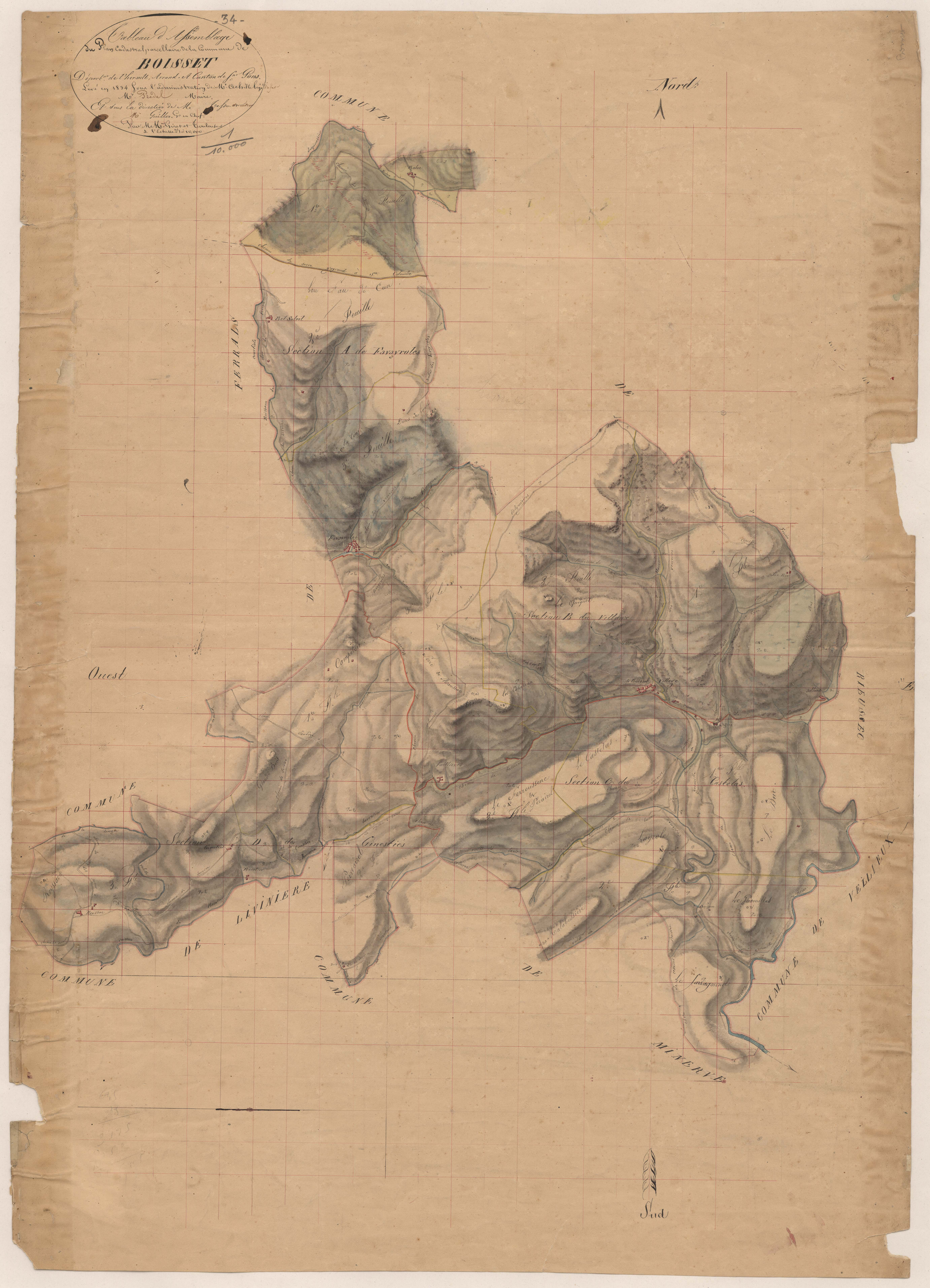 Boisset. - Cadastre napoléonien : tableau d'assemblage.